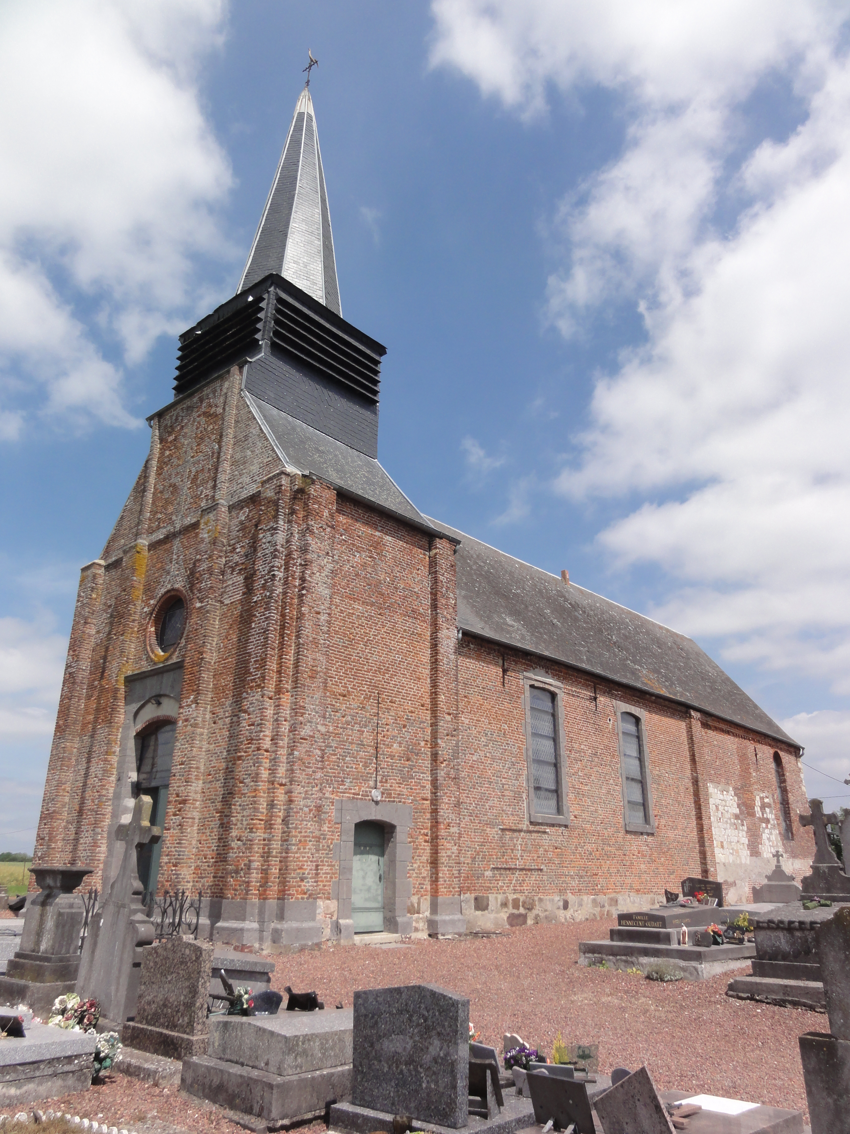 La Neuville-lès-Dorengt (Aisne) église